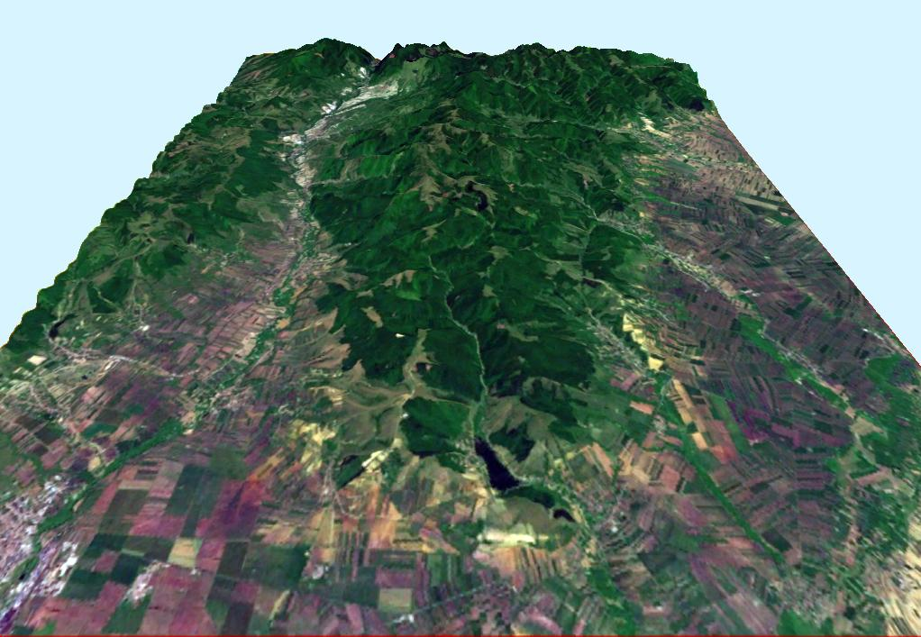 Muntii Bodocului 3D. Imagine realizata cu date SRTM si textura World Imagery.